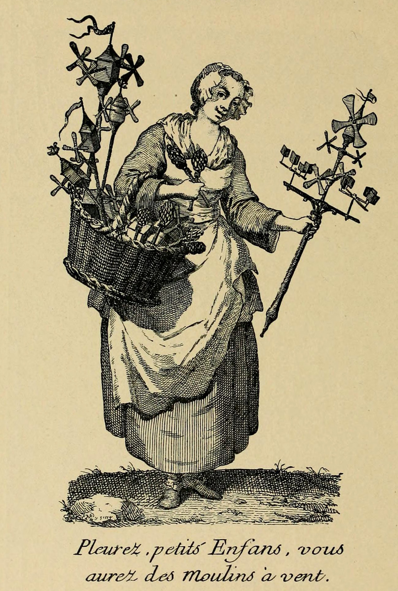 Illustration from Histoire des jouets